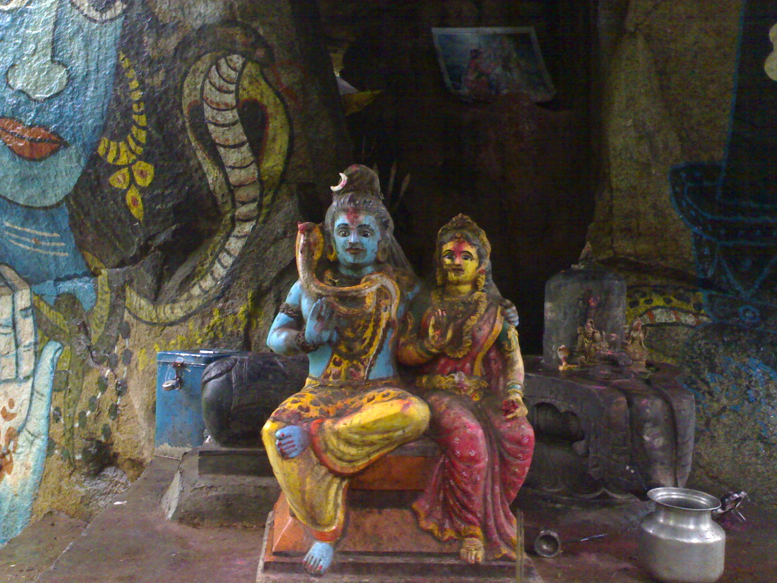 గ్రామం నుండి సుమారు 2కి.మీ దూరంలో కొండ పైన వెలసిన శివుడు